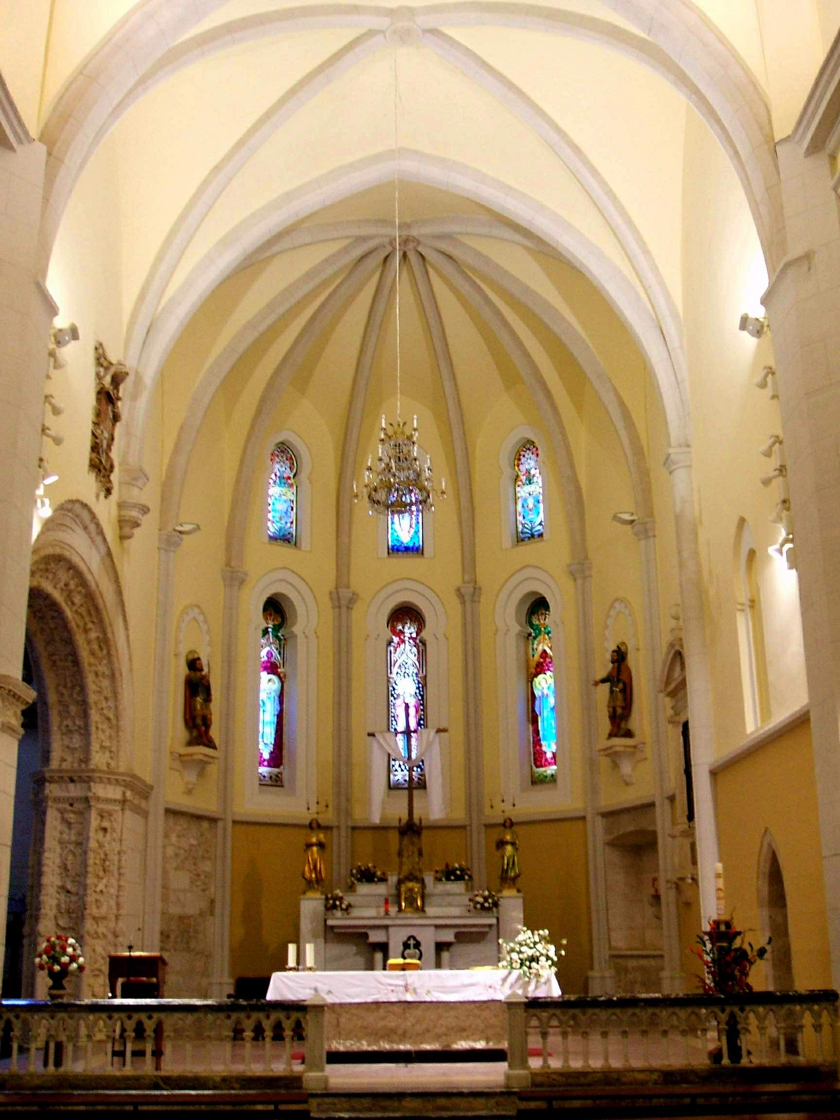 Capilla mayor de la iglesia del convento de San Pablo de Peñafiel, fundado en 1324 por el célebre escritor y magnate Don Juan Manuel (1282-1348), hijo del infante Manuel de Castilla y nieto del rey Fernando III el Santo. Provincia de Valladolid, (España).